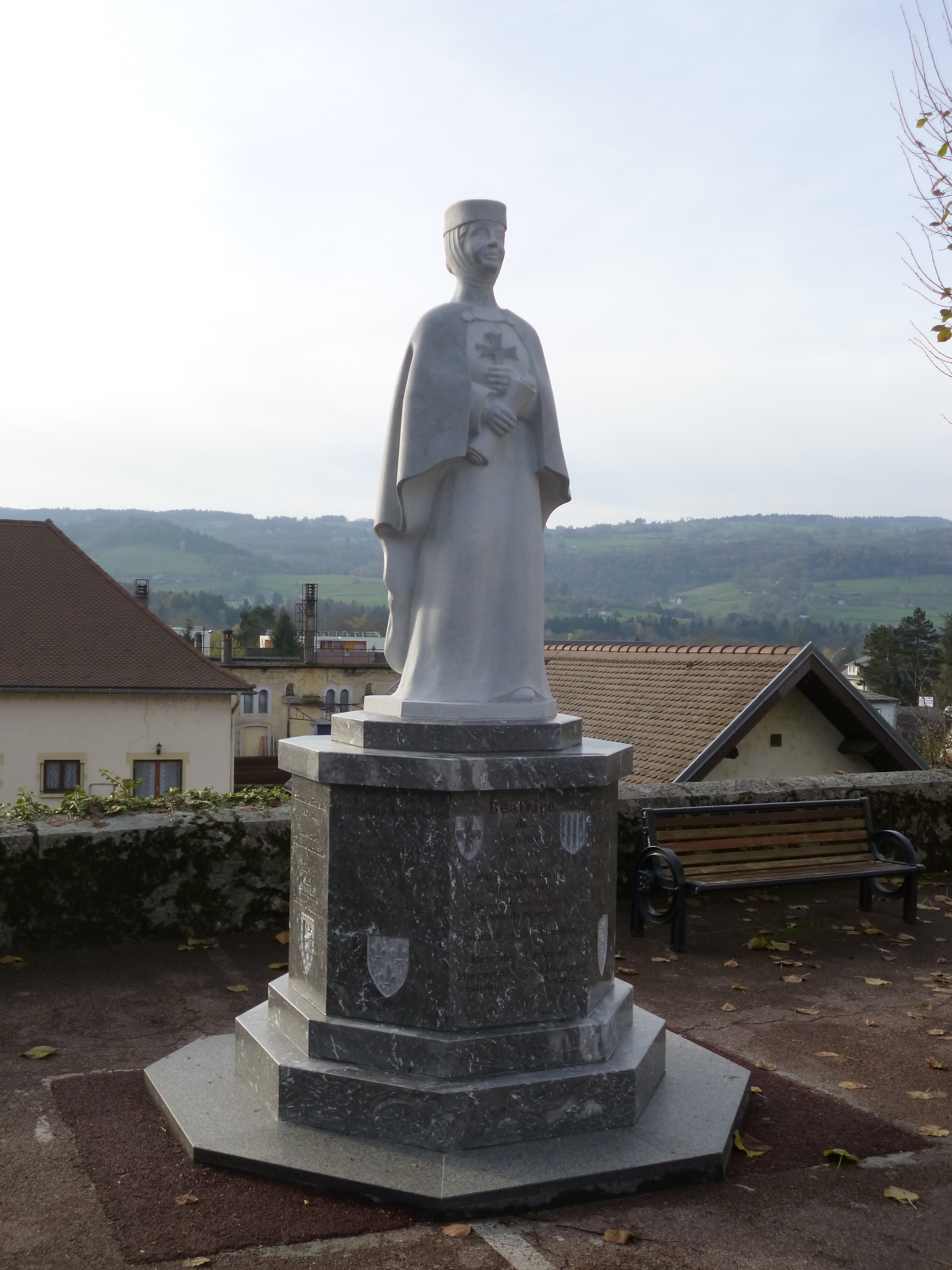 Statue de Béatrice de Savoie Les Échelles, Savoie, France Novembre 2016